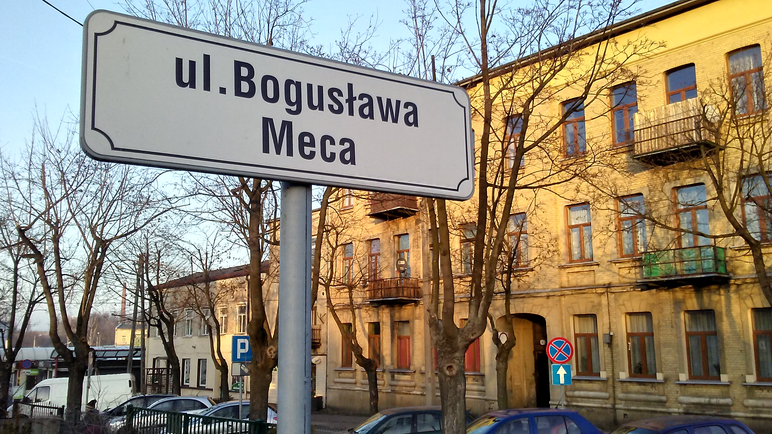 Tomaszów Mazowiecki w województwie łódzkim. Ulica Bogusława Meca. PL, EU. CC0